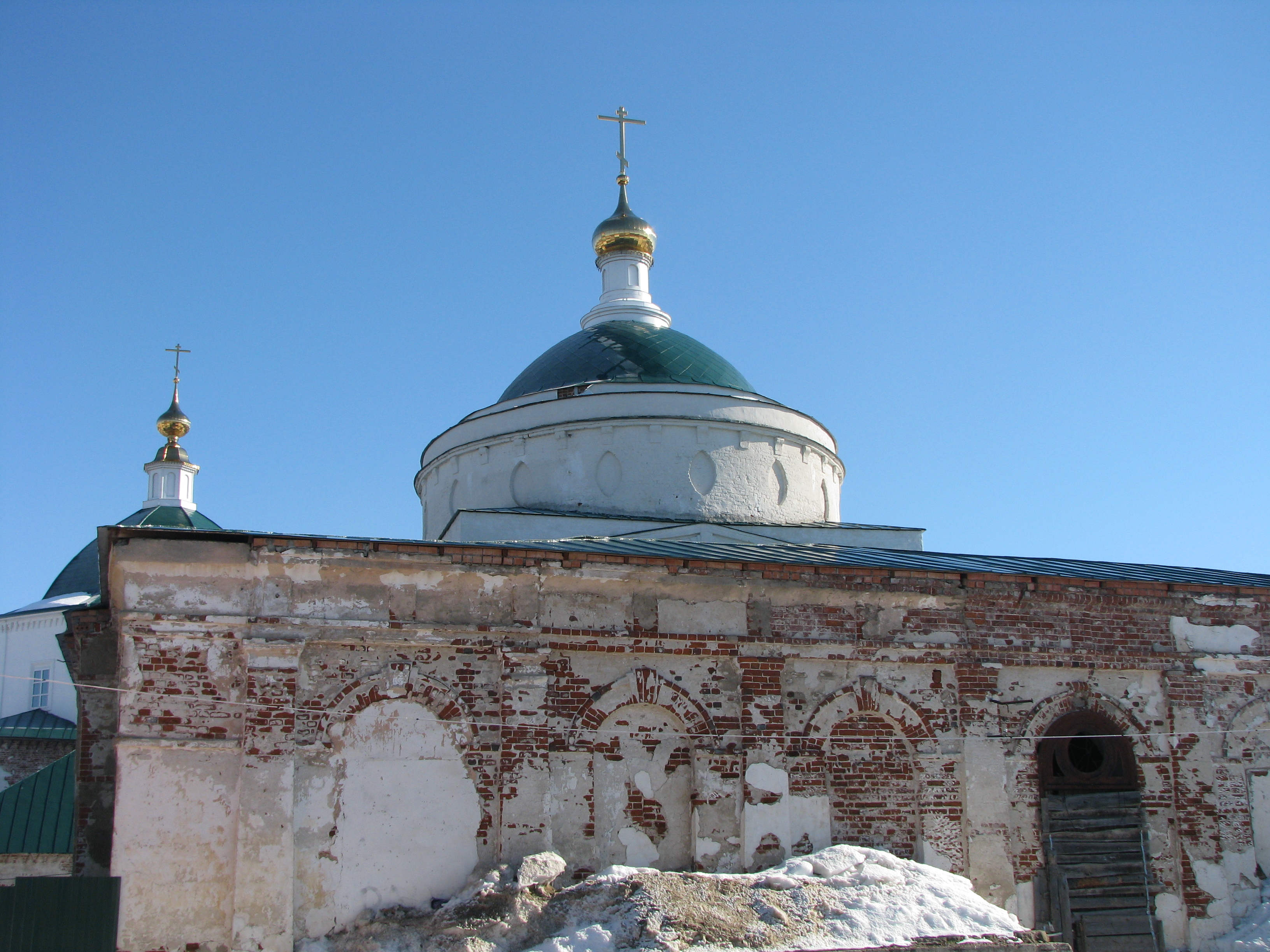 Христорождественская церковь: Советская площадь, Лежнево, Лежневский район, Ивановская область